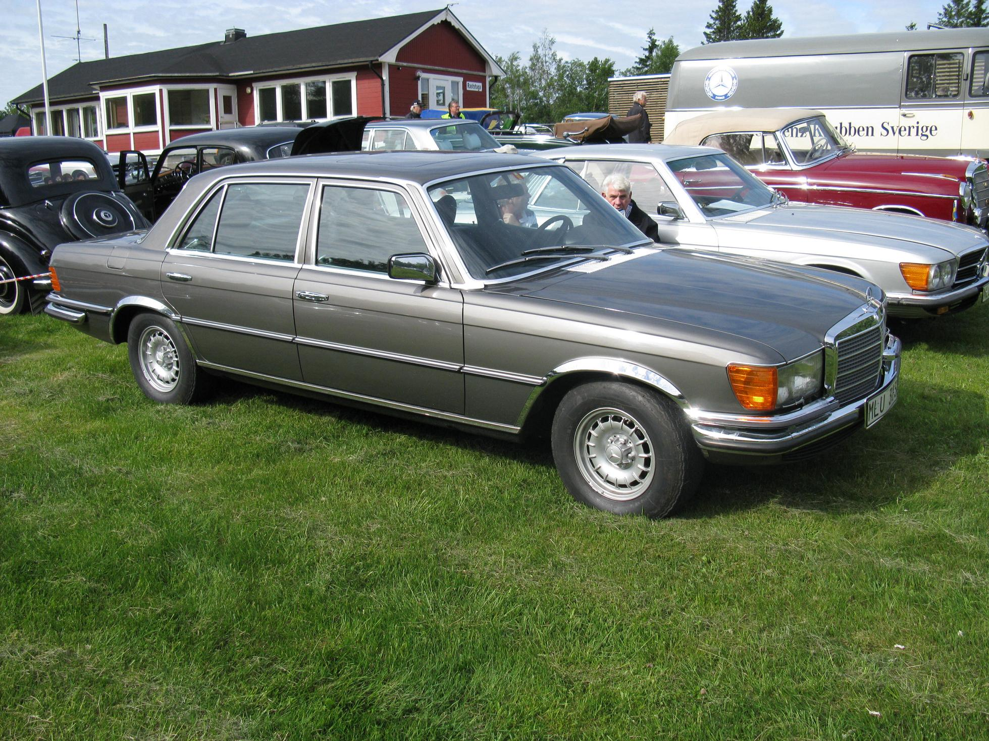 Mercedes-Benz 450 SEL 6.9